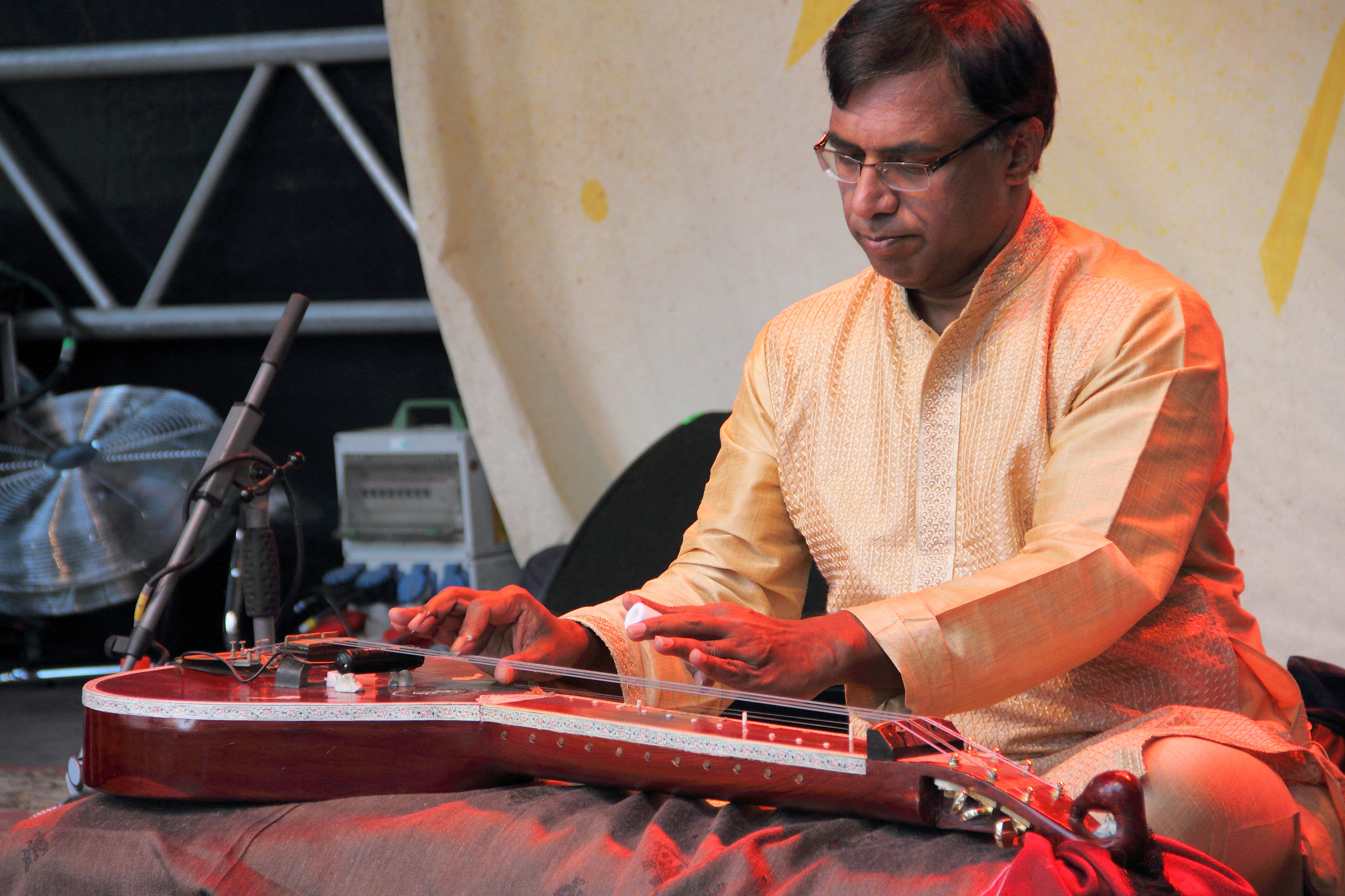 Der Chitravina-Virtuose Chitravina N Ravikiran auf dem Rudolstadt-Festival 2017.